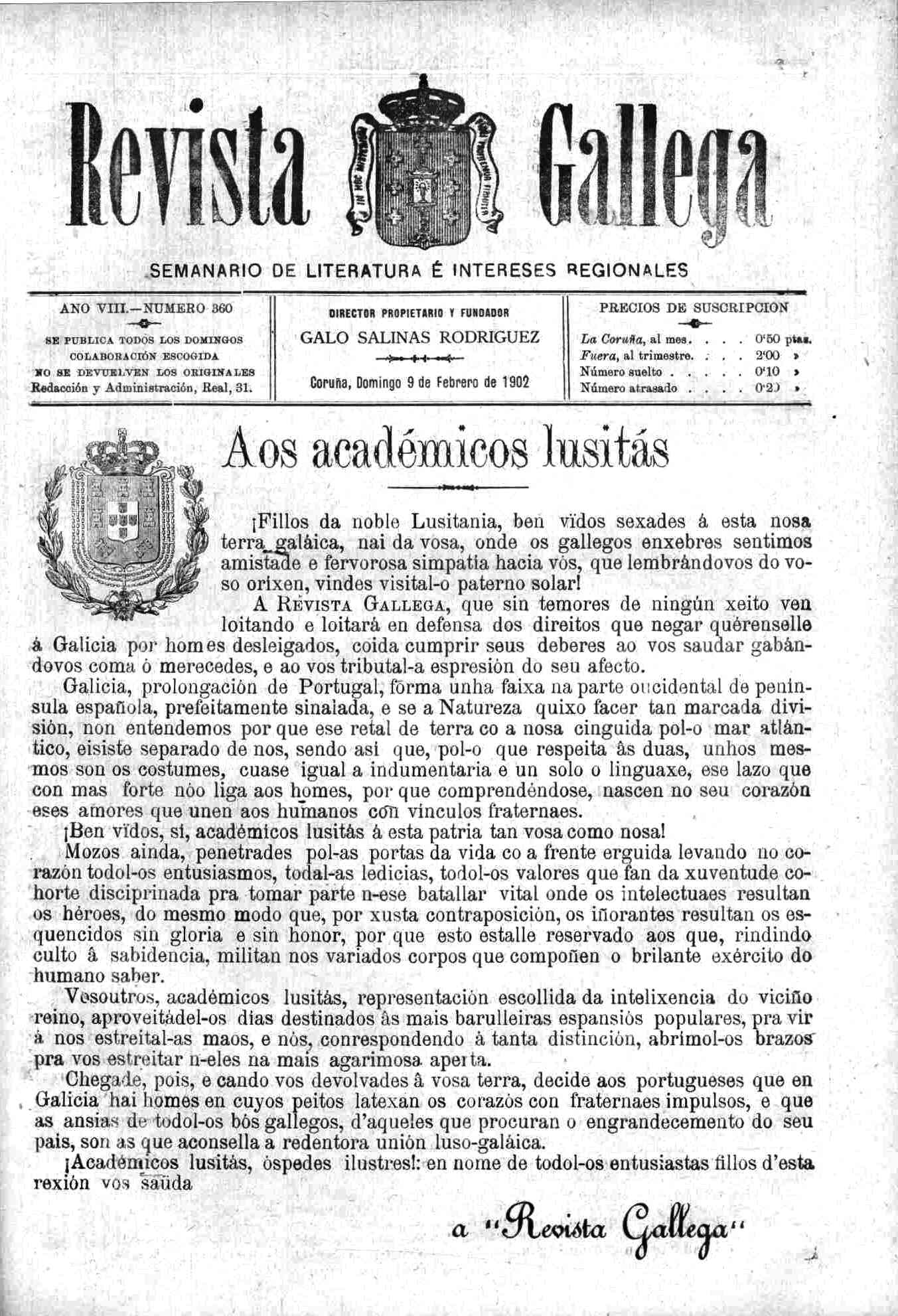 Capa do número 360 da Revista Gallega que saúda a visita de estudantes portugueses á Galiza